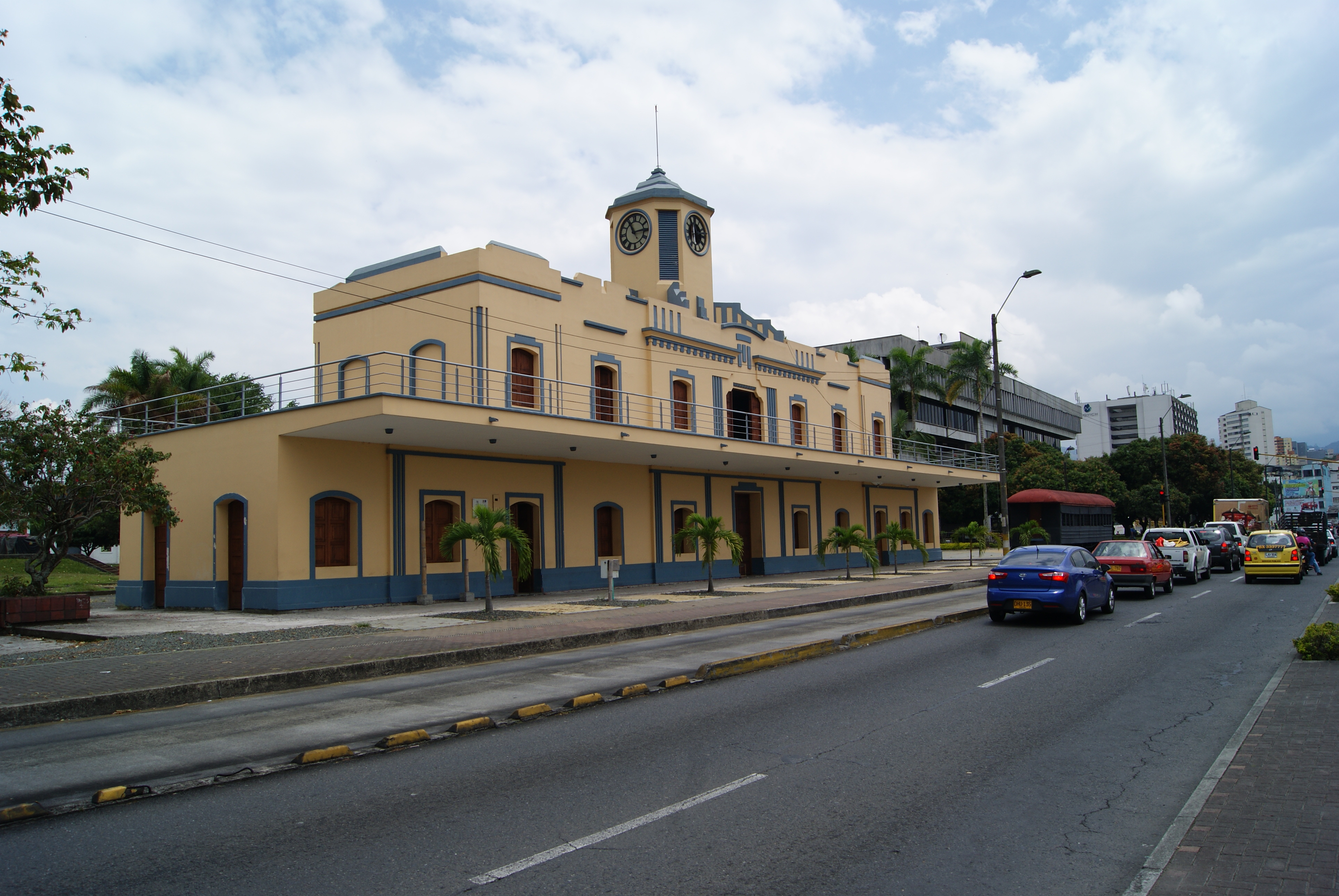 Estación del Ferrocarril Pereira. Parque Olaya Herrera.